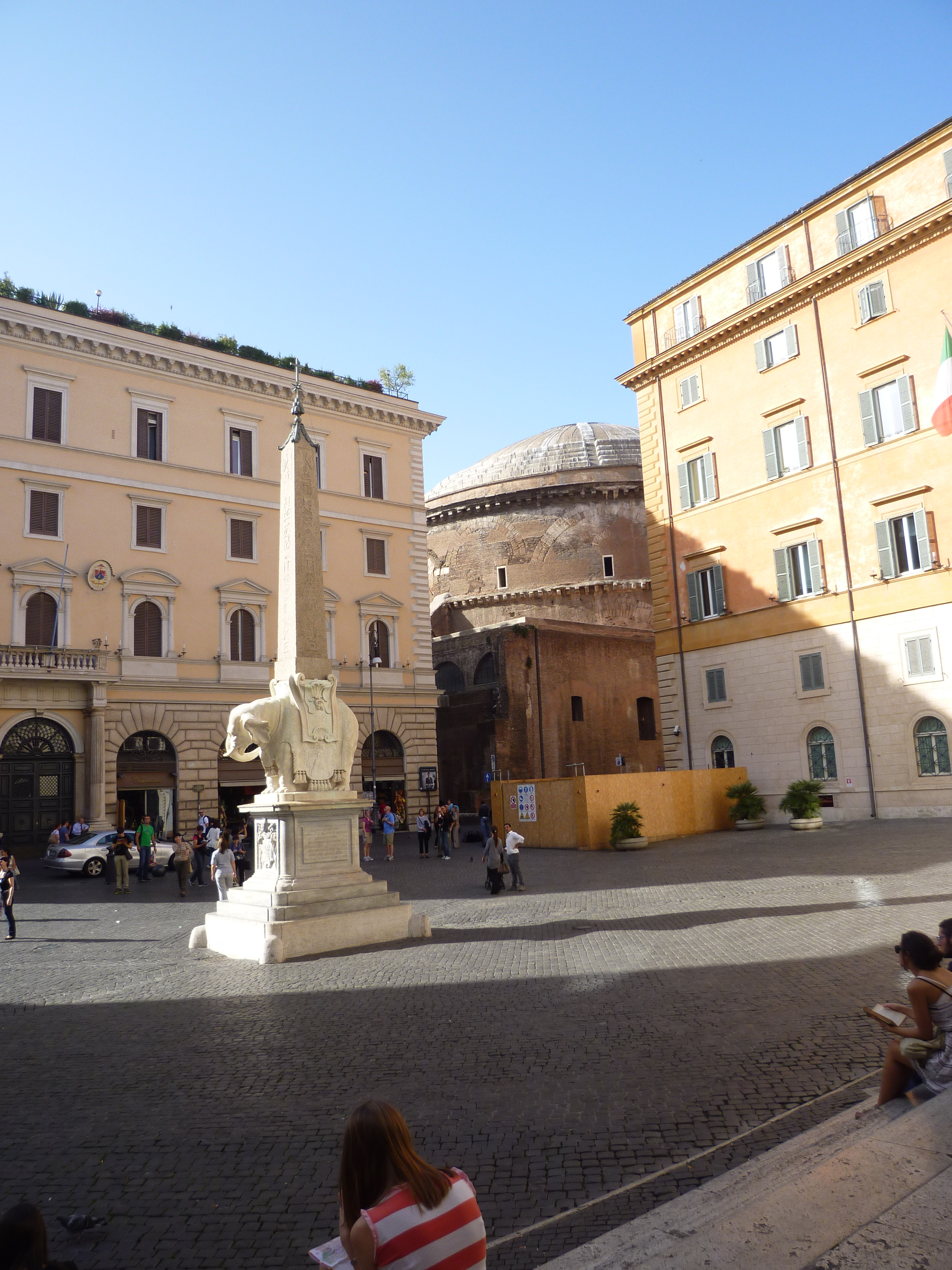 Rome, summer 2012